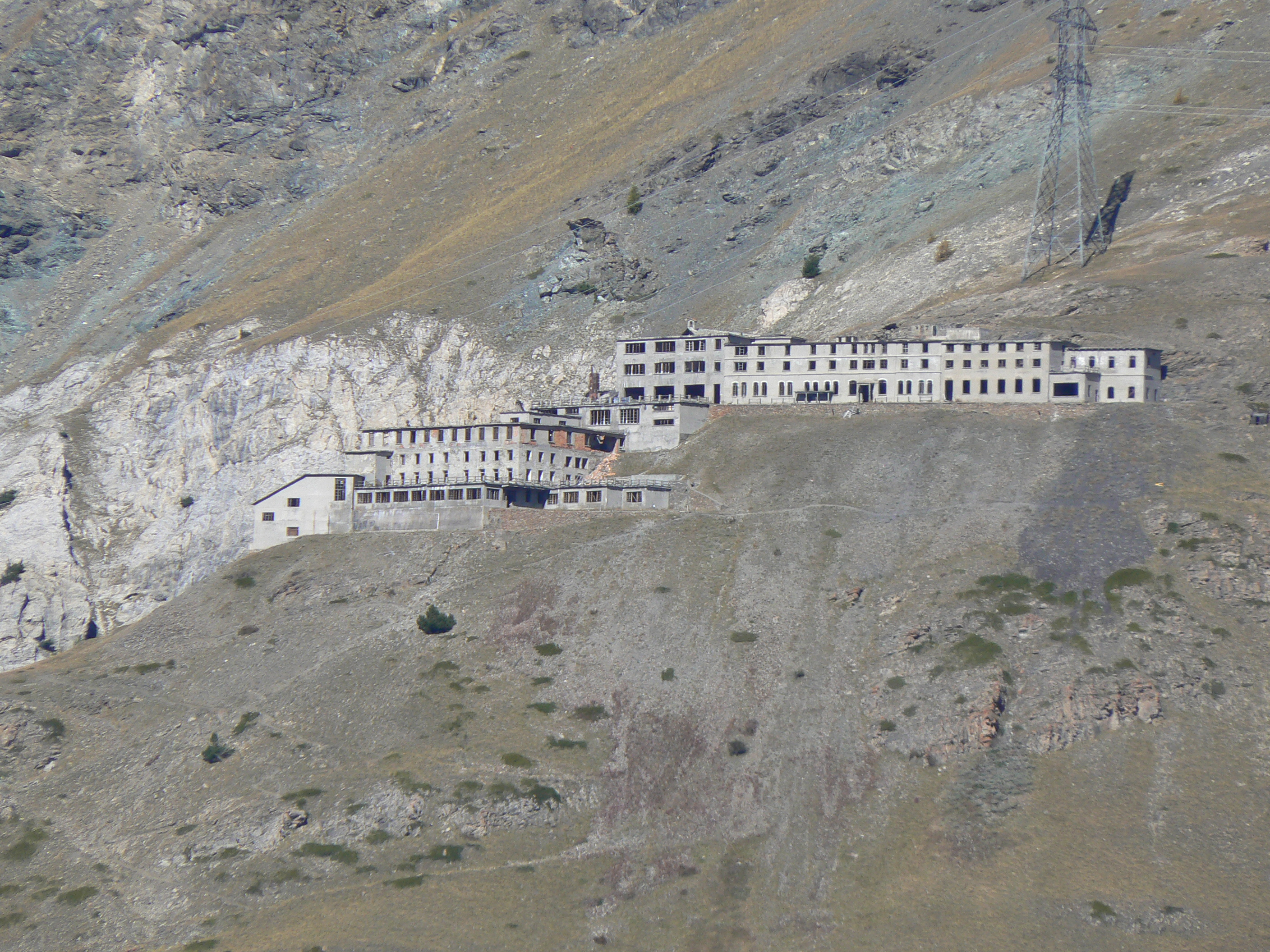 Villaggio Minatori di Colonna visto dal sentiero per il Lago di Loie – La miniera di Cogne. Valle d'Aosta, Italia. This is a photo of a monument which is part of cultural heritage of Italy.